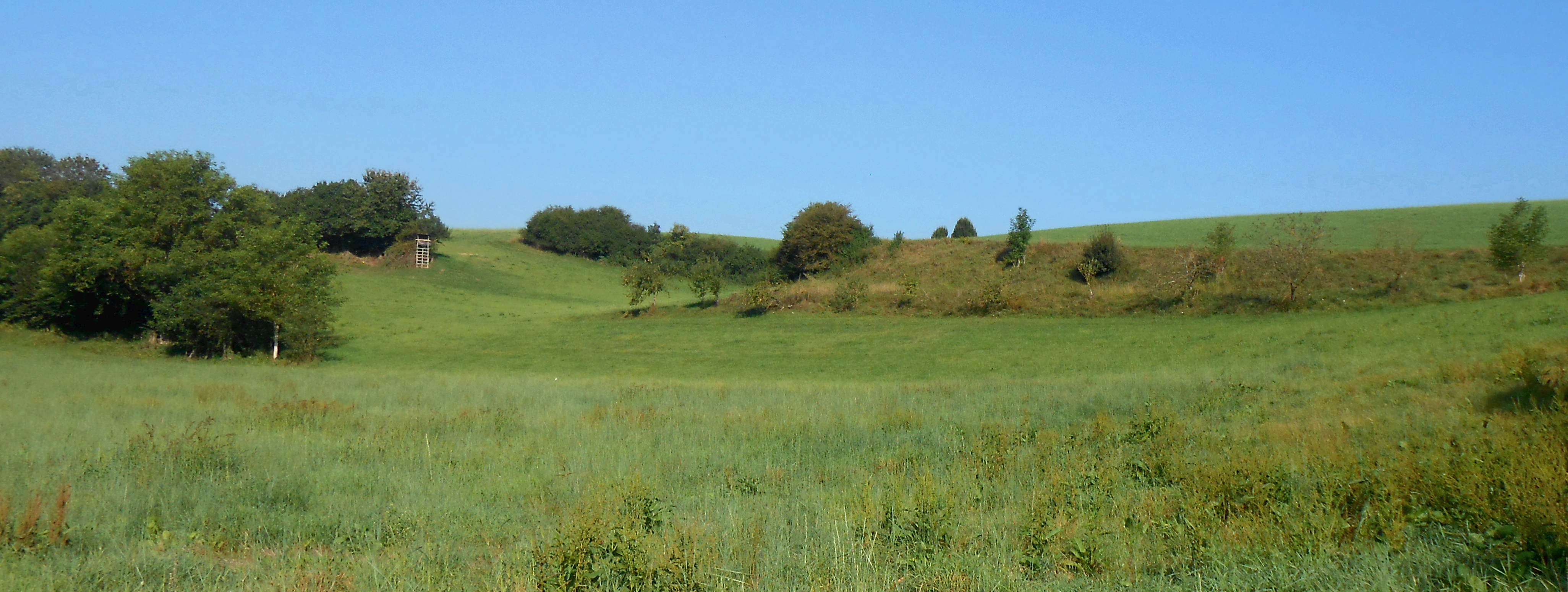 Stufenförmige Landschaft in der Schlemengrube bei Mindelaltheim